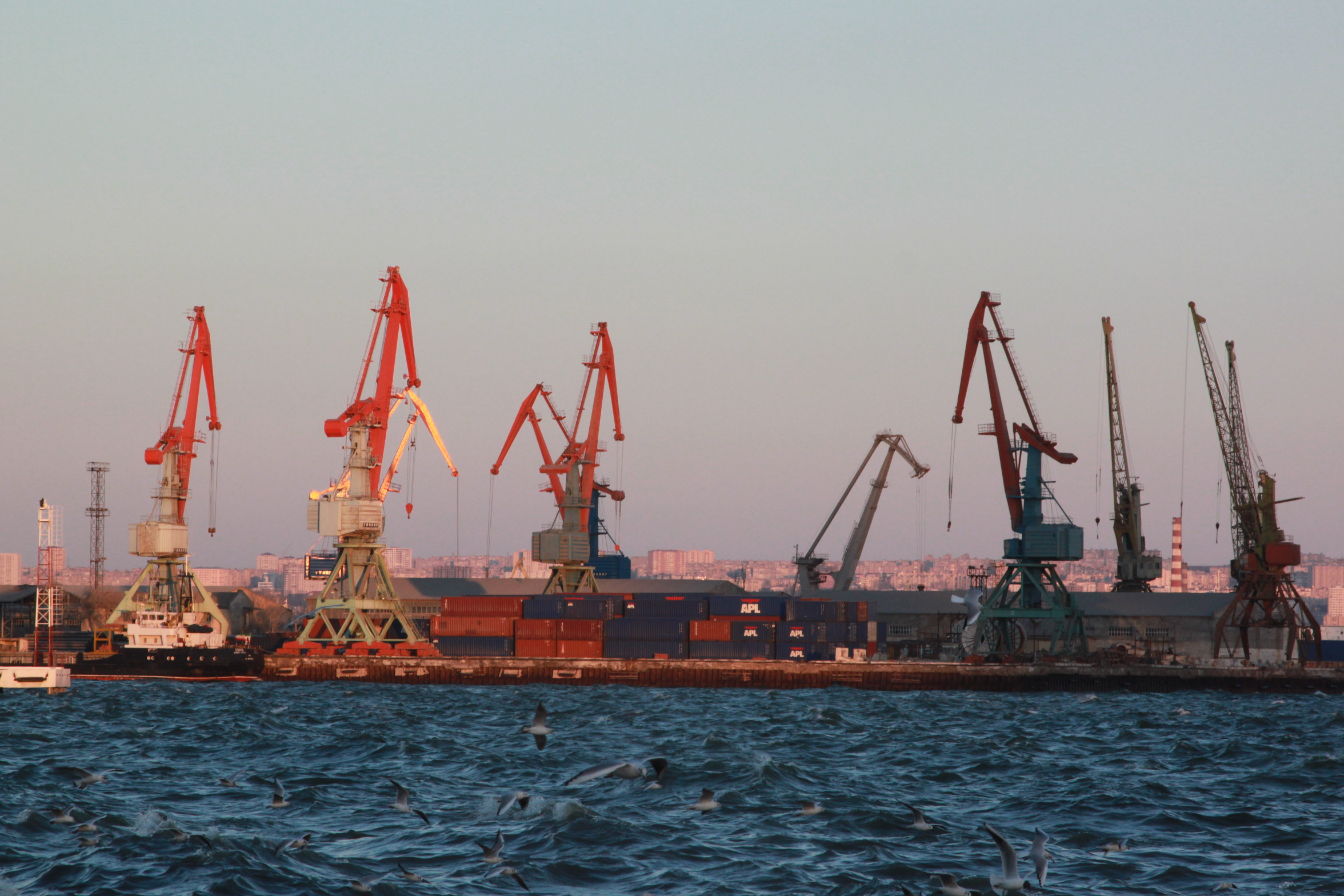 Бакинская бухта. Бакинский порт. Разгрузка. Каспийское море. Баку. Апшерон.